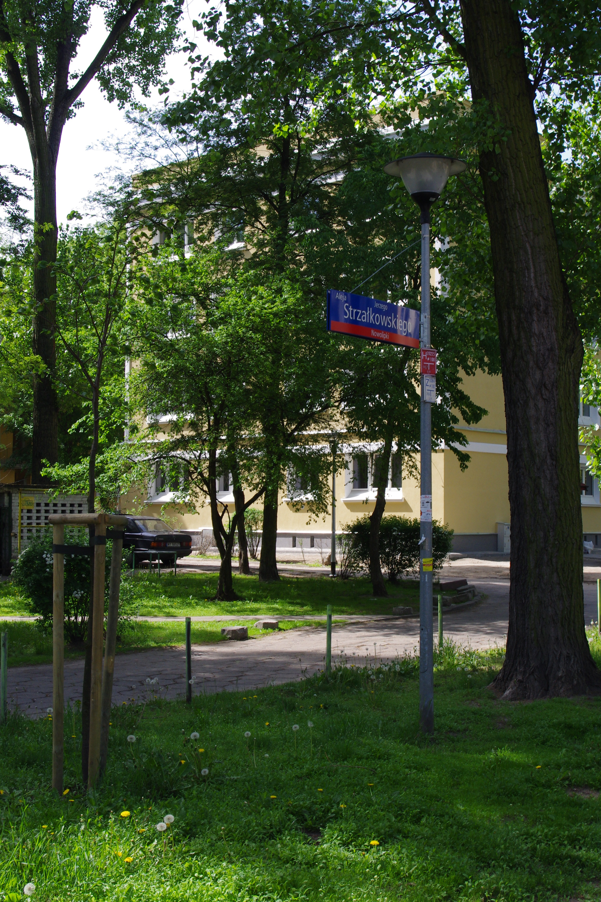 Aleja spacerowa (ciąg pieszy - alei topolowej) im. Pułk. Jerzego Strzałkowskiego na warszawskiej Woli pomiędzy ulicami Nowolipie i Nowolipki